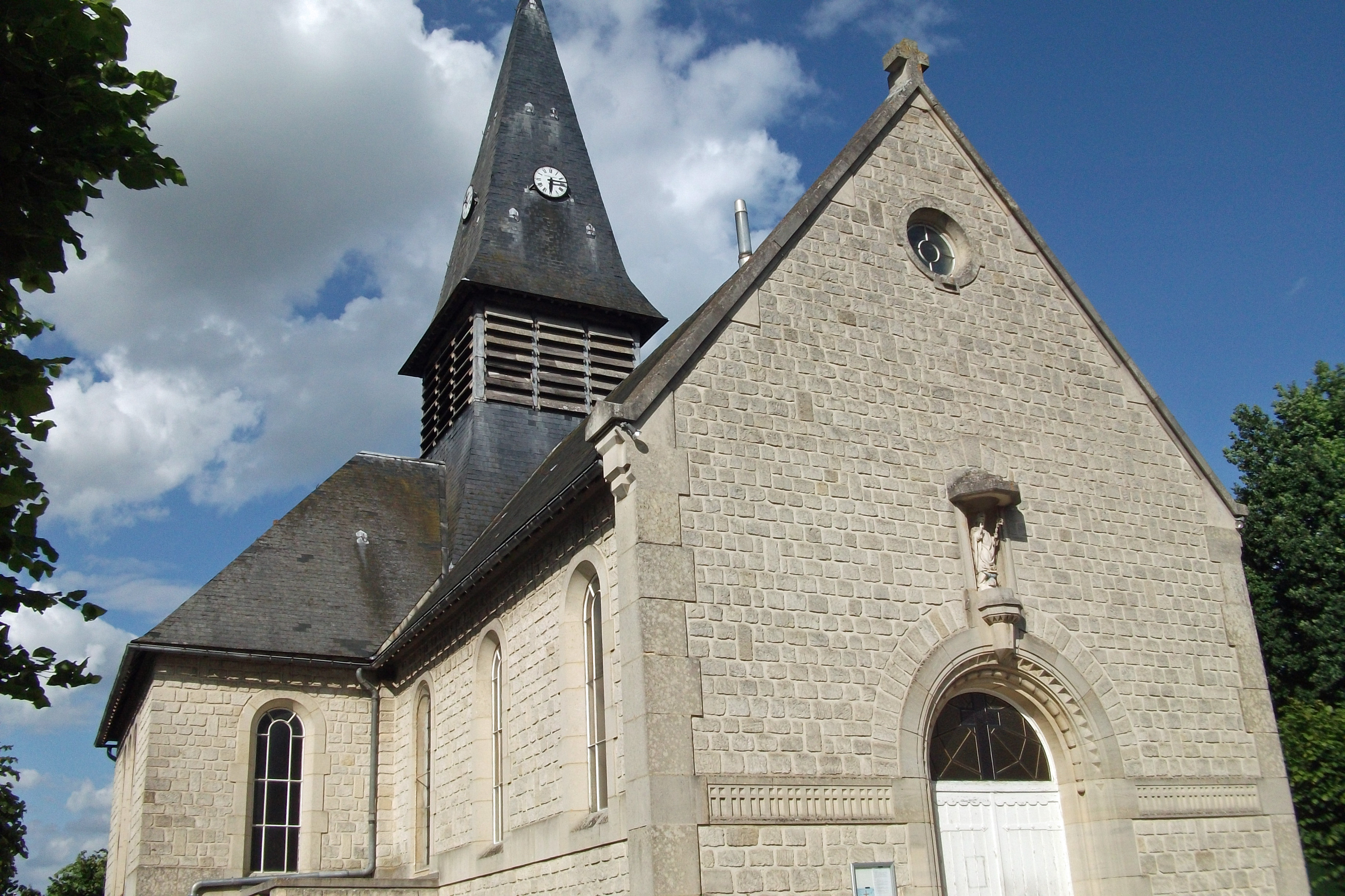 Chapelle du château de Sept-Saulx.